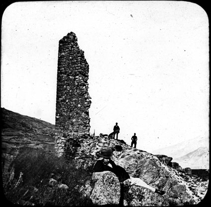 Fonds Trutat - Photographie ancienne Lieu de création : Mont-Louis (Pyrénées-Orientales) Observations : Note manuscrite de Trutat : " ruines du vieux Mont-Louis, Pyrénées-Orientales ". Mot(s)-clé(s) : -- Ruines -- Citadelle -- Pierre -- Homme -- Ascension -- Colline -- Mont-Louis (Pyrénées-Orientales) -- Pyrénées-Orientales (Languedoc-Roussillon) -- Languedoc-Roussillon (France) -- 19e siècle, 2e moitié -- 20e siècle, 1e quart